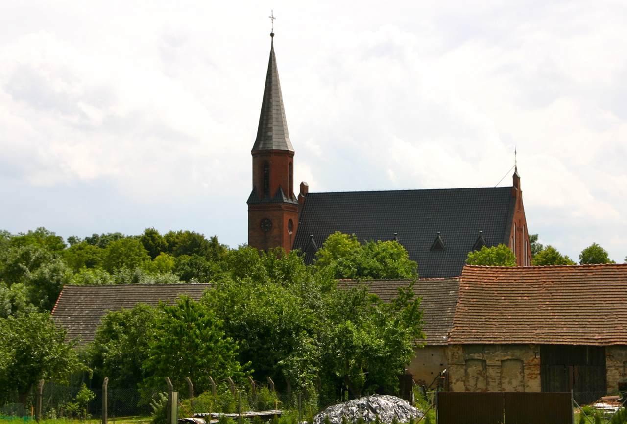 Walce - rzymskokatolicki kościół parafialny pw. św. Walentego, 1892-1894.